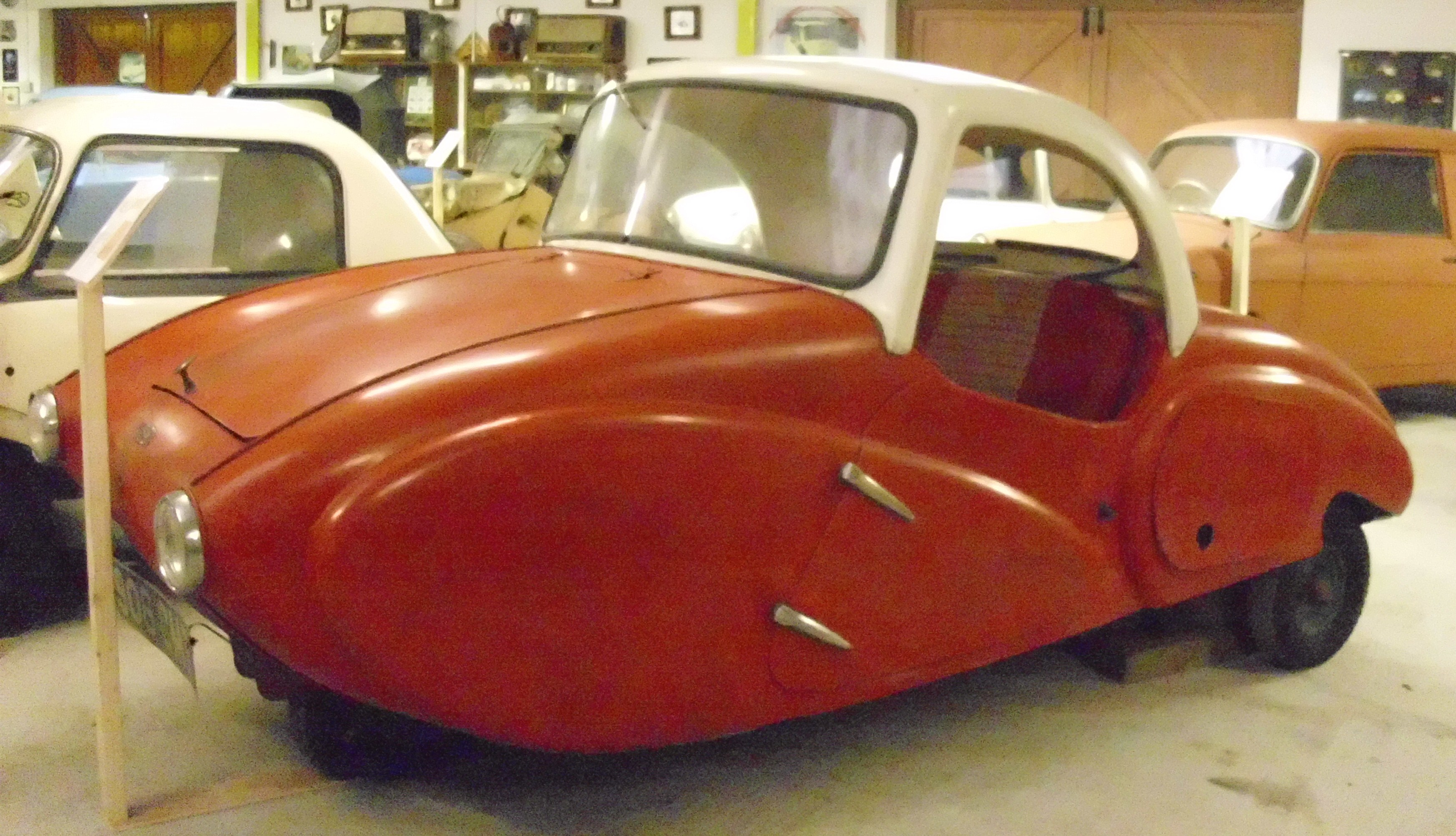 Allard Clipper 1954